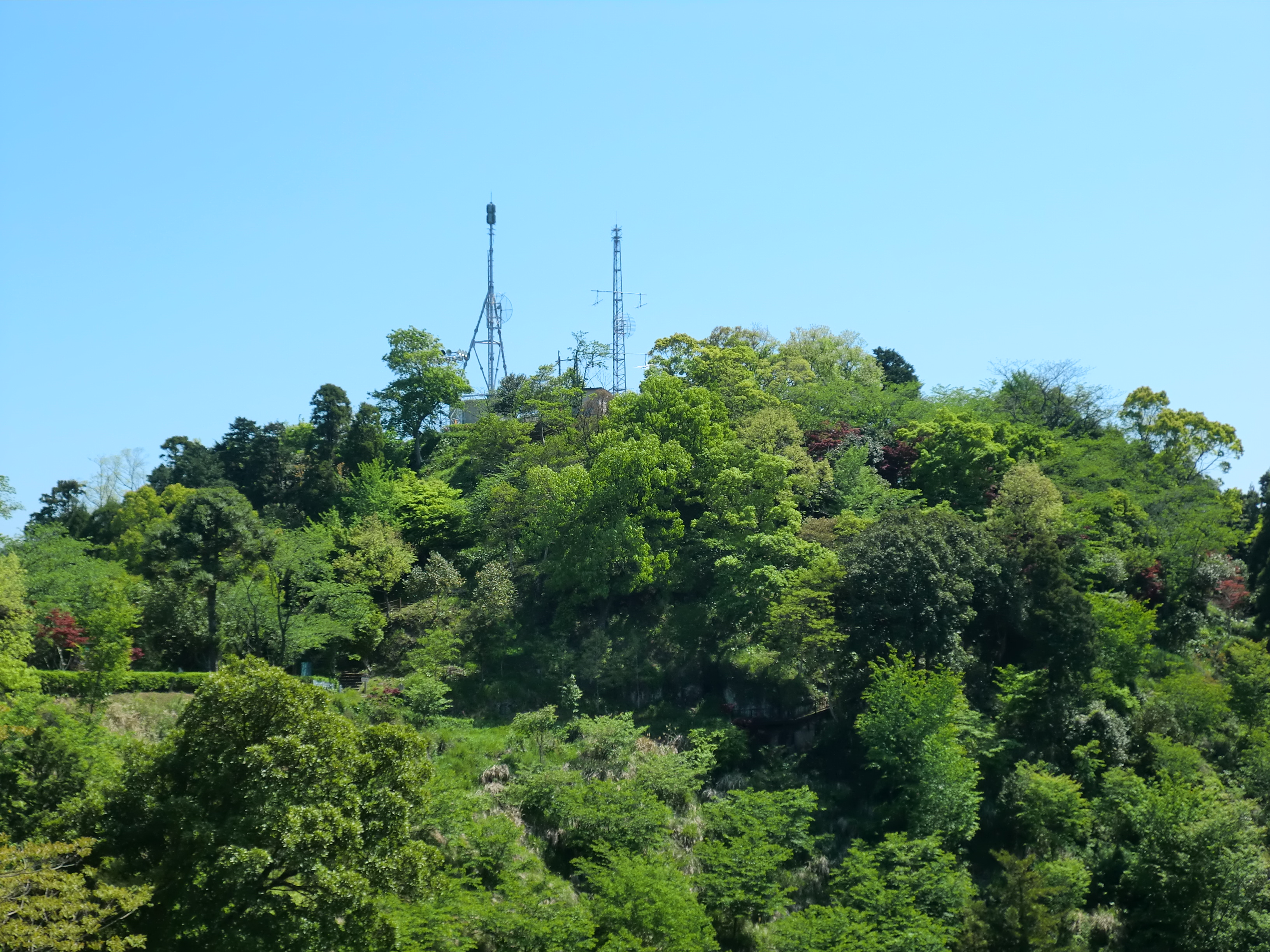 熊本県津奈木町にある舞鶴城（まいづるじょう）公園から見た津奈木（つなぎ）中継局